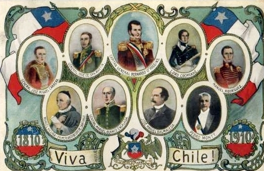 Tarjeta postal de Chile en el centenario de su independencia. Arriba, de izquierda a derecha: General José Miguel Carrera, General José de San Martin, Capitán General Bernardo O'Higgins, Lord [Thomas] Cochrane, Manuel Rodríguez. Abajo, de izquieda a derecha: Manuel Vicuña, primer arzobispo de Santiago; General Manuel Blanco Encalada, José Manuel Balmaceda, Pedro Montt.